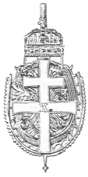 Orden der Ritter vom Goldenen Sporn (Ungarn)